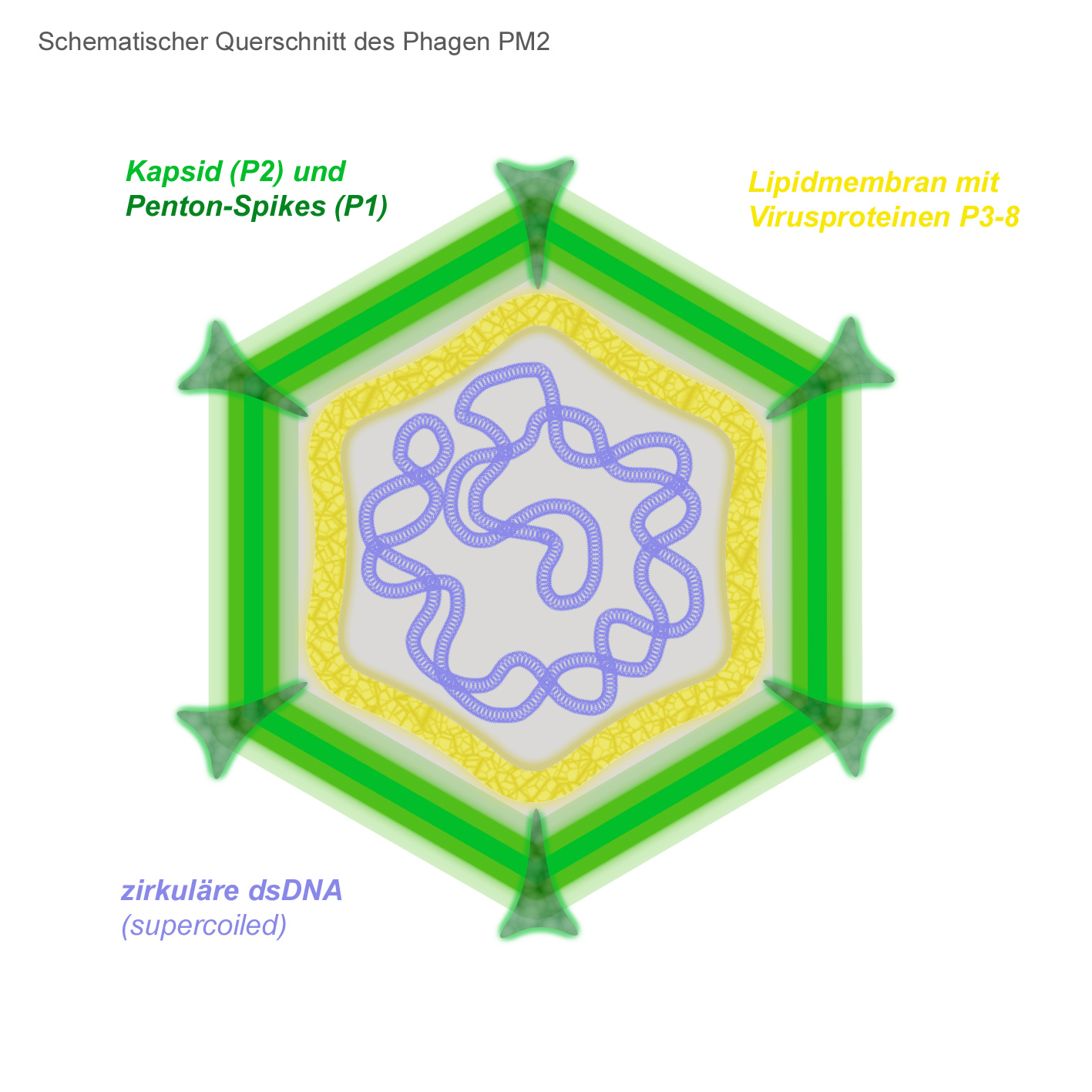 Schematischer Querschnitt des Phagen PM2 der Virusfamilie „Corticoviridae“